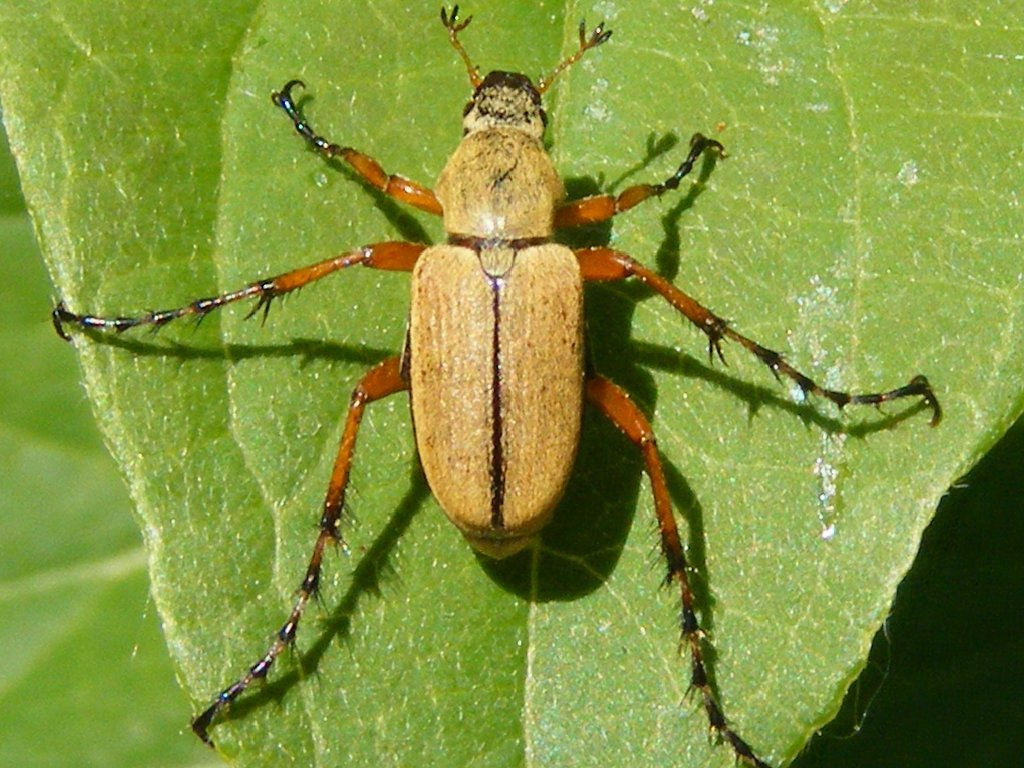 Macrodactylus subspinosus (Scarabée du rosier)